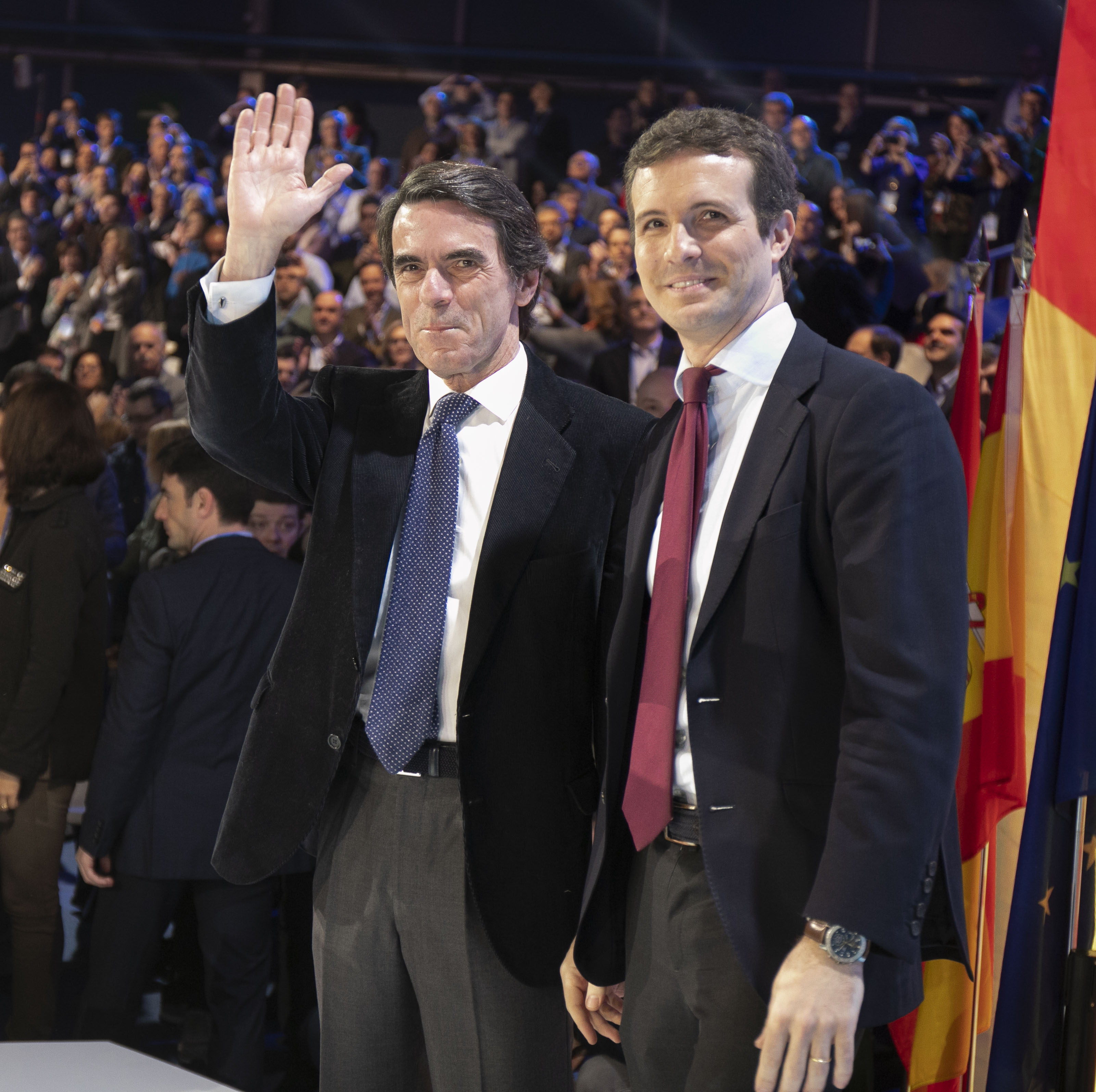 Segunda jornada de la Convención 2019 del Partido Popular en Madrid.